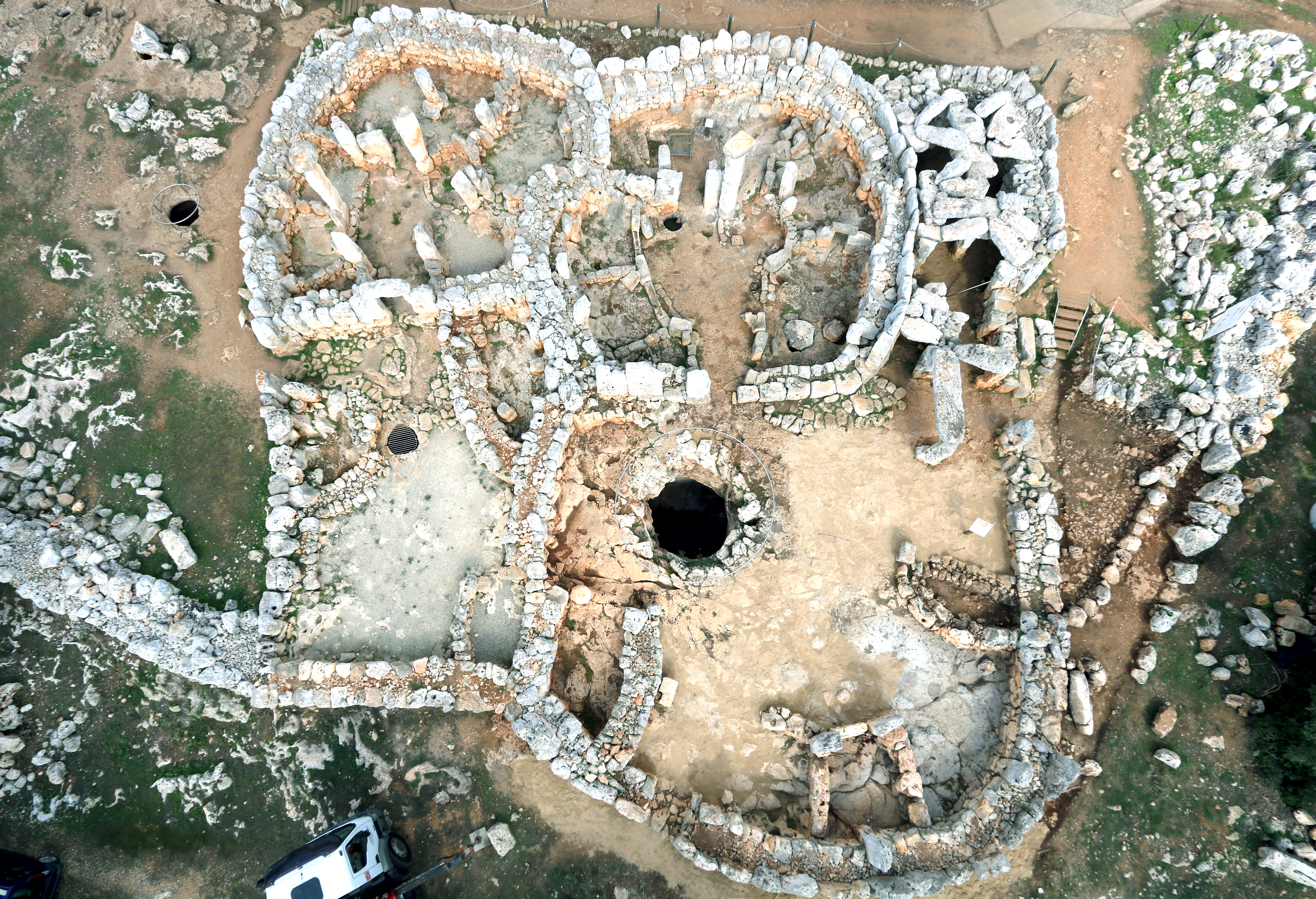 Fotografia aèrea dels Cercles 7 i 6 de Torre d'en Galmés (Alaior, Menorca) i els seus patis davanters